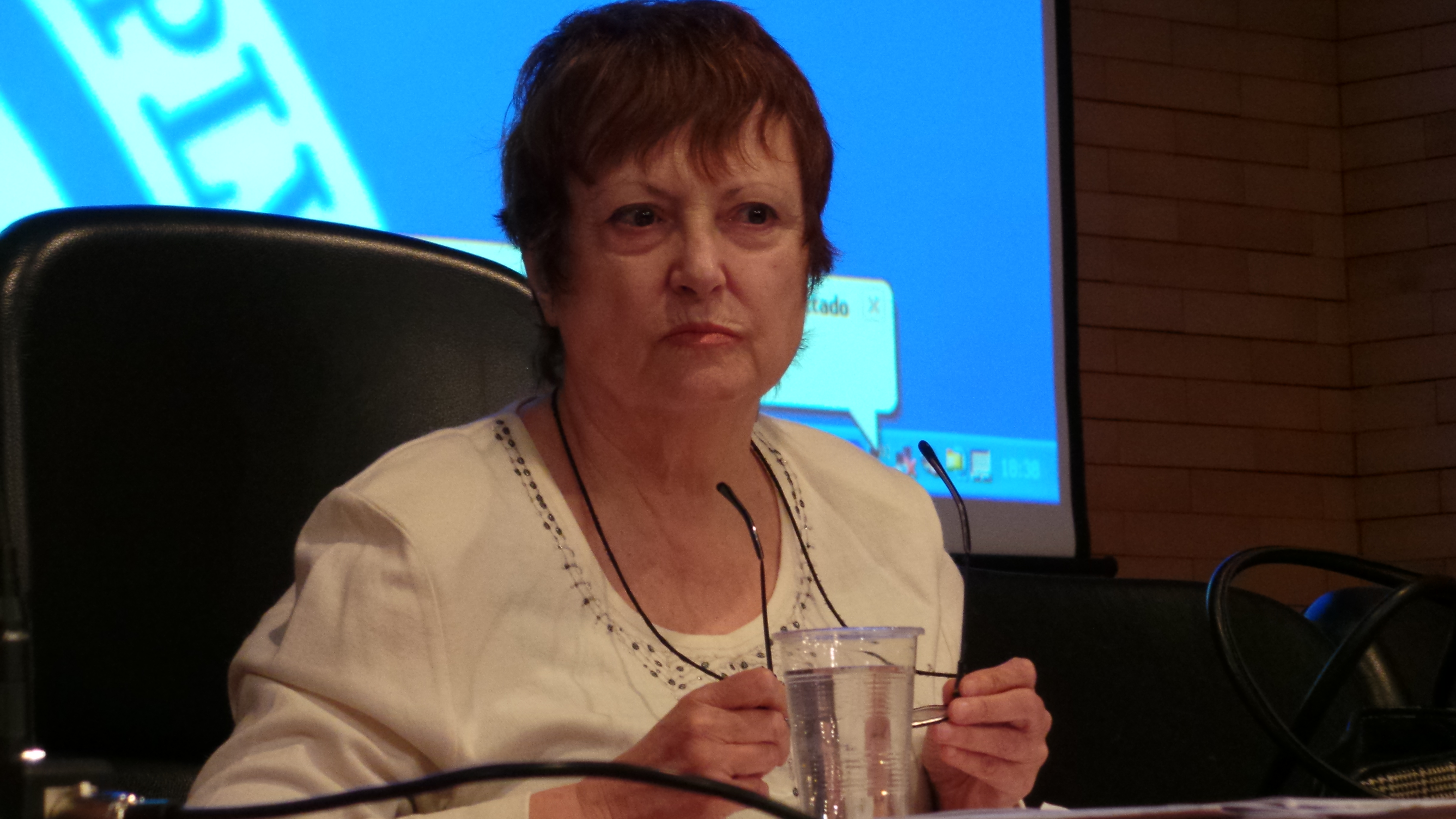 Filósofa española. Una fotografía de Montserrat Boix Madrid